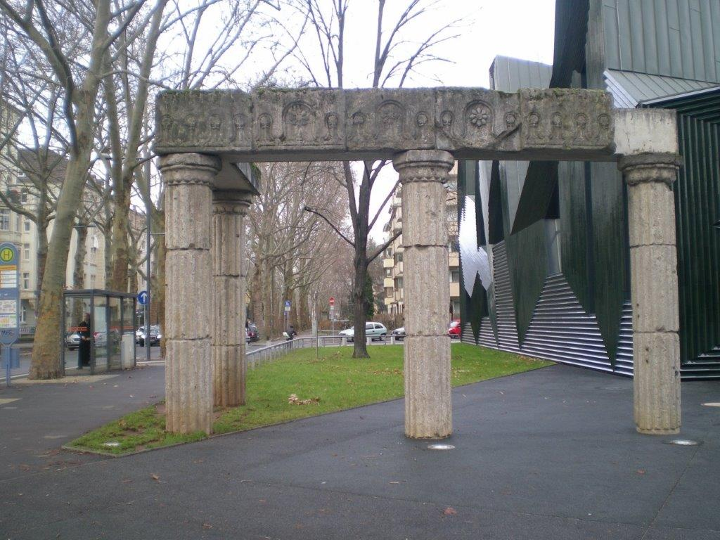 שרידים מבית הכנסת הגדול במגנצא